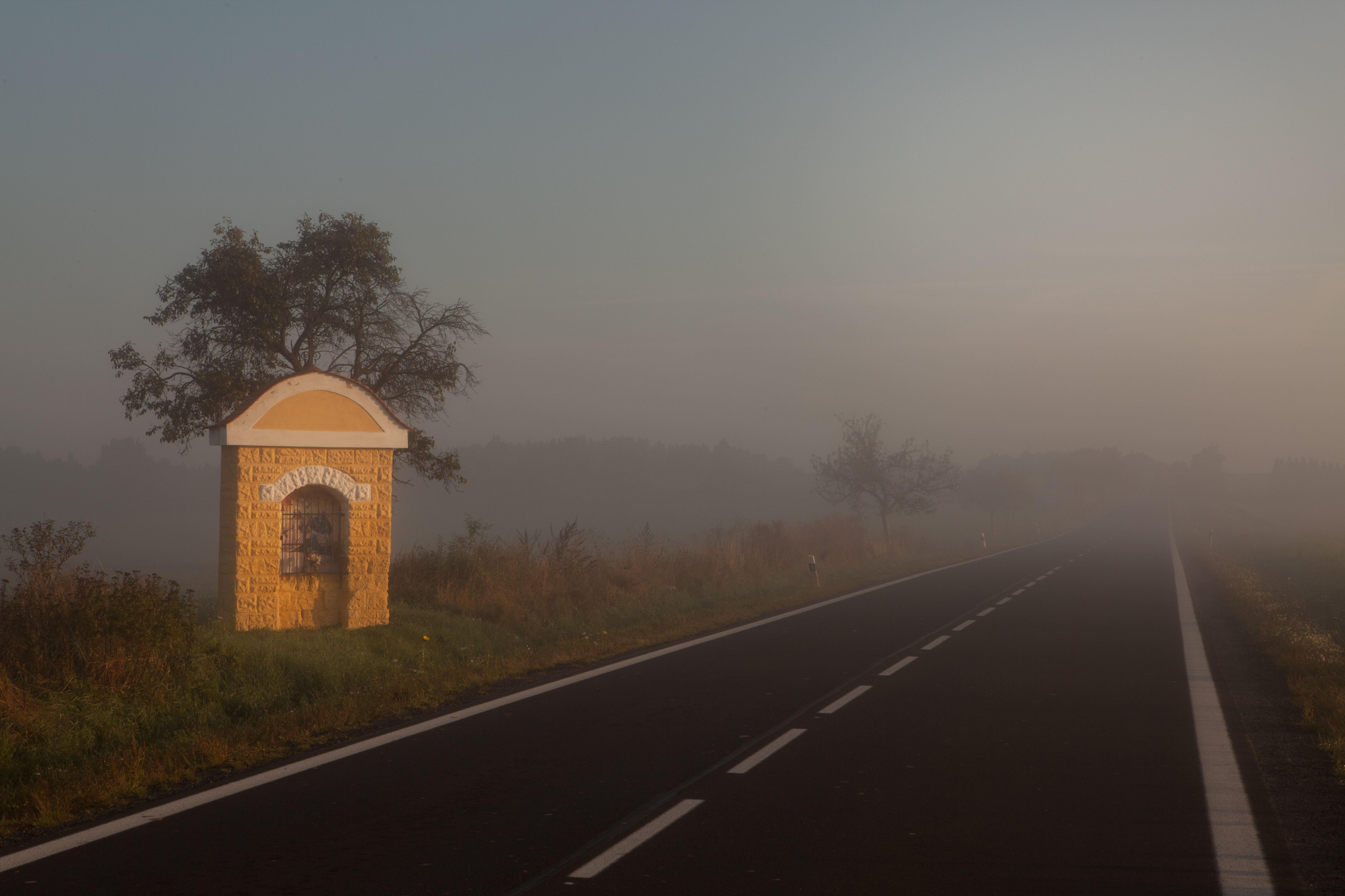 Jesenice, okres Rakovník. Výklenková kaple u silnice I/27 (Žatecká) severovýchodně od města.